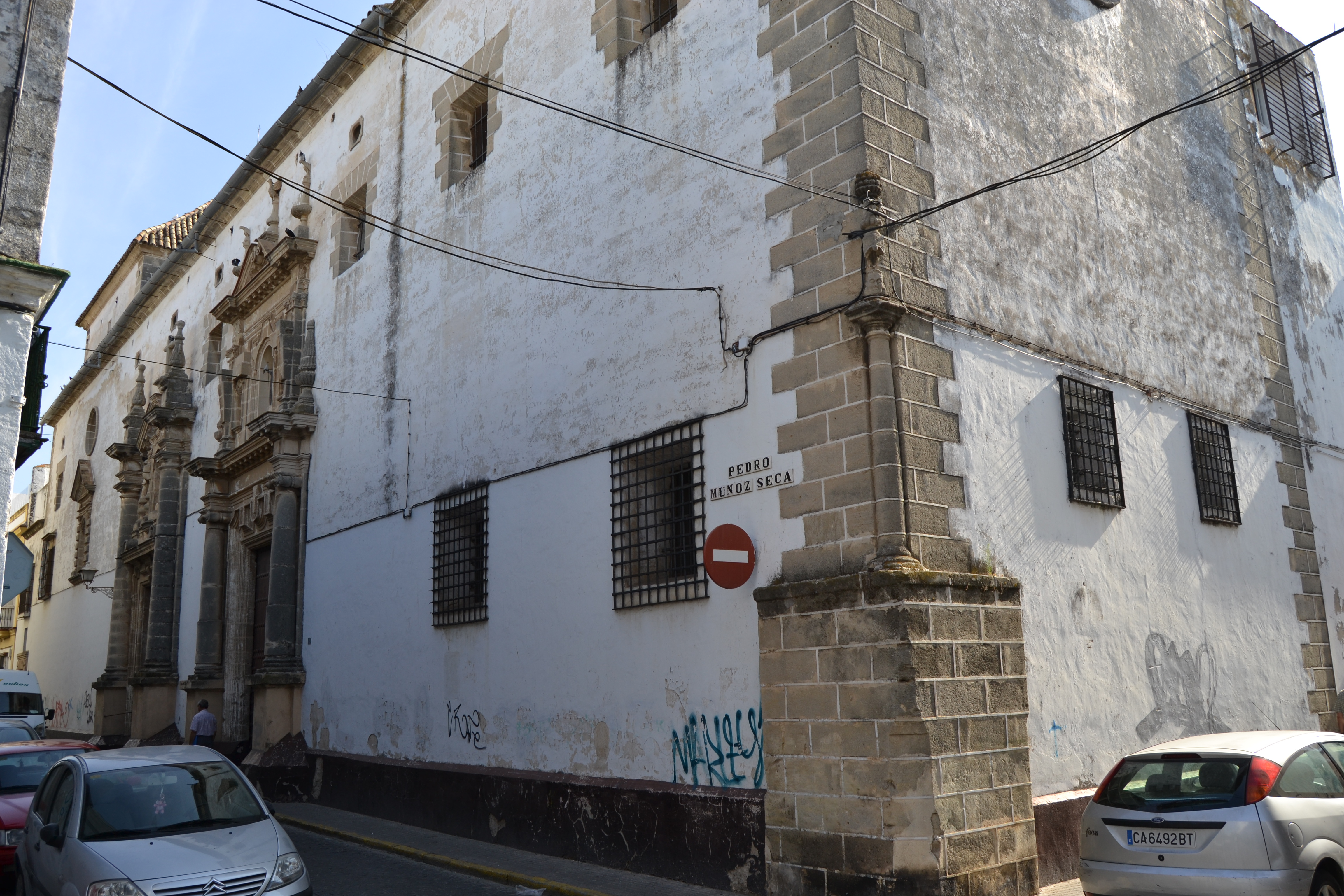 El Puerto de Santa María, Andalucía, España